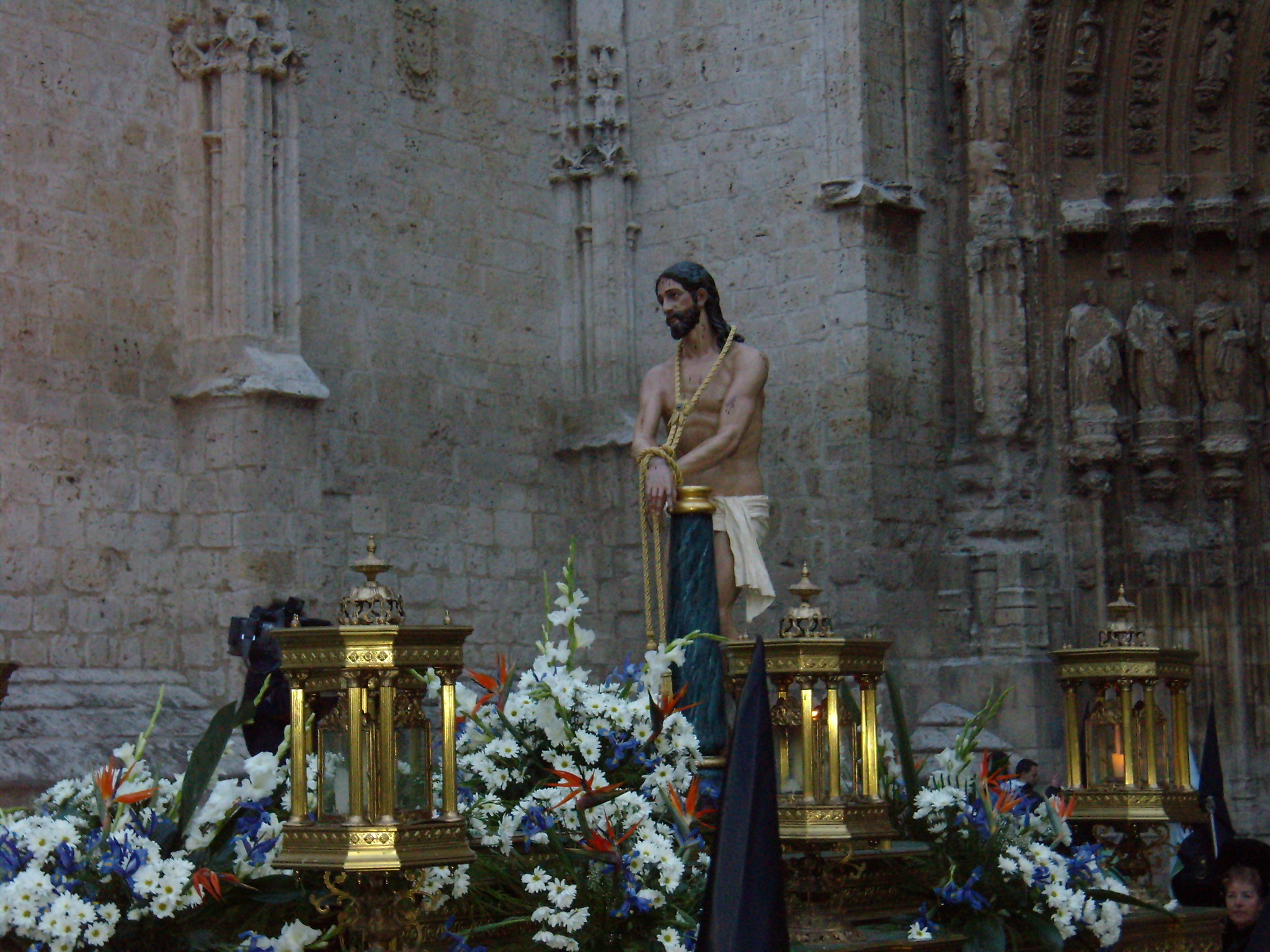 Cristo atado a la columna, siglo XVII. Semana Santa de Palencia.